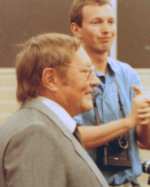 Rudolf Augstein 1985 in Hamburg bei einem Simultanspiel des späteren Schachweltmeisters Garry Kasparov, eine Veranstaltung des Nachrichtenmagazins Der Spiegel.